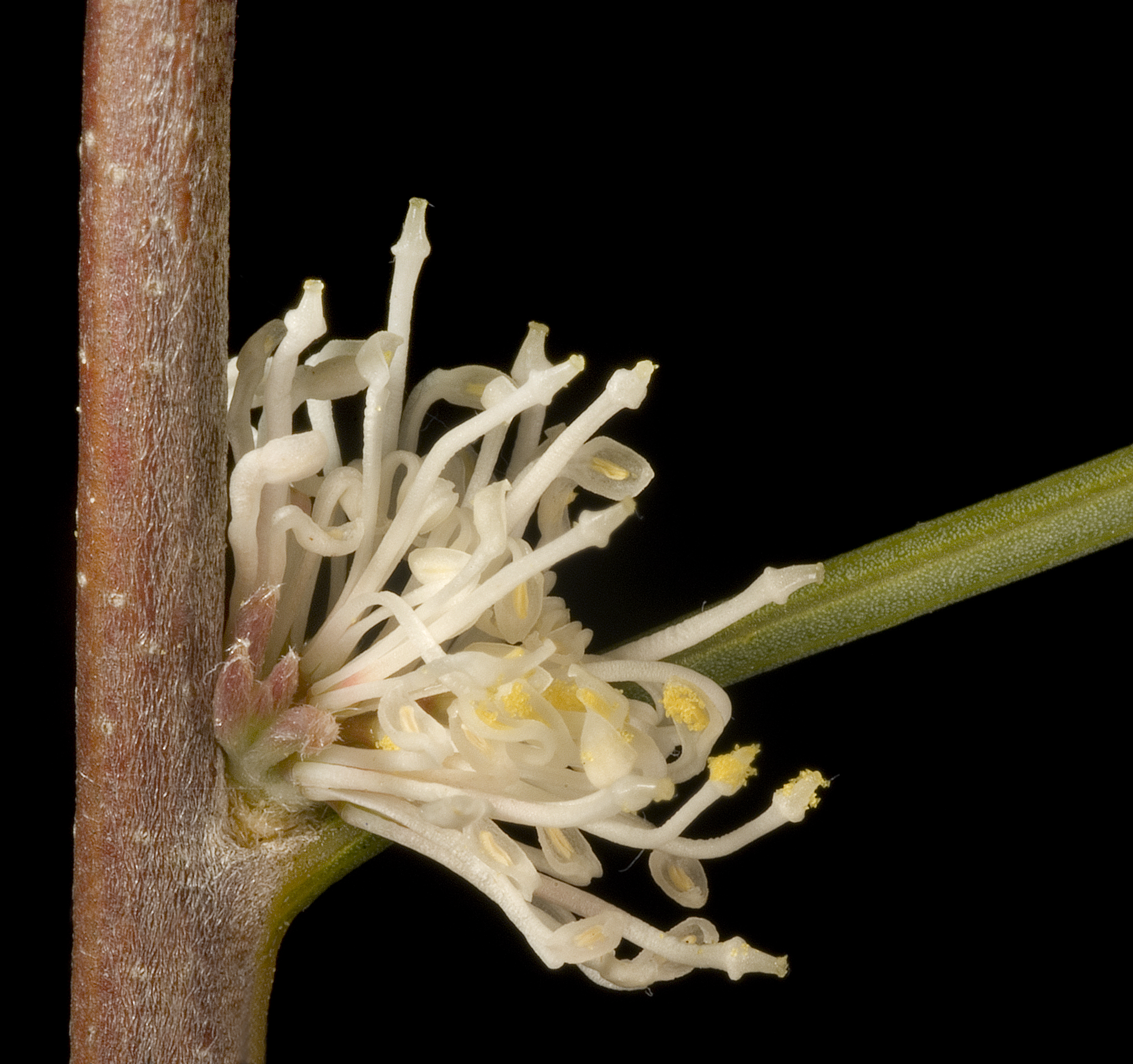 KRT3826